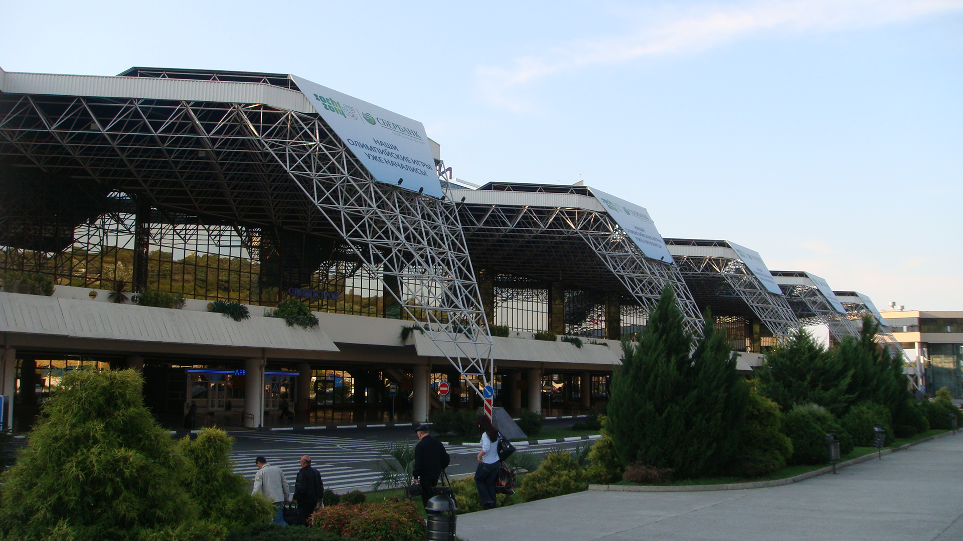 Сочинский аэропорт-2